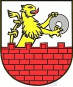 Herb Parysowa w powiecie garwolińskim.